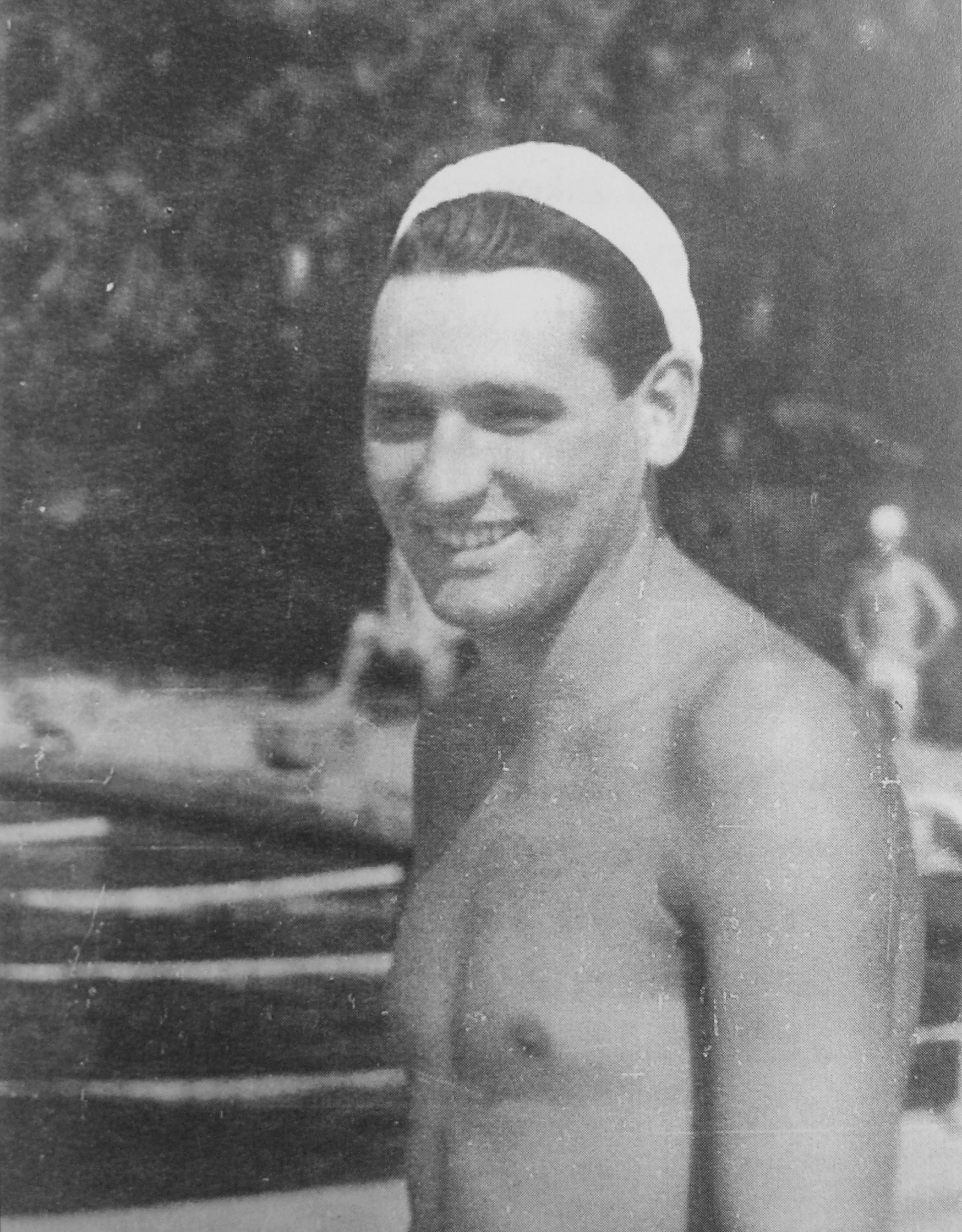 Gotfryd Gremlowski (1931–1987) Polish swimmer.